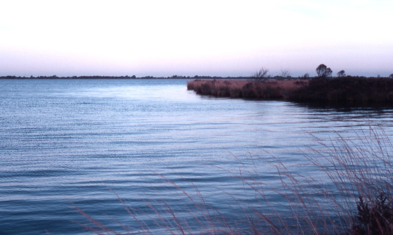 Abendstimmung am Ewigen Meer in Ostfriesland, dem größten Hochmoorsee Deutschlands.